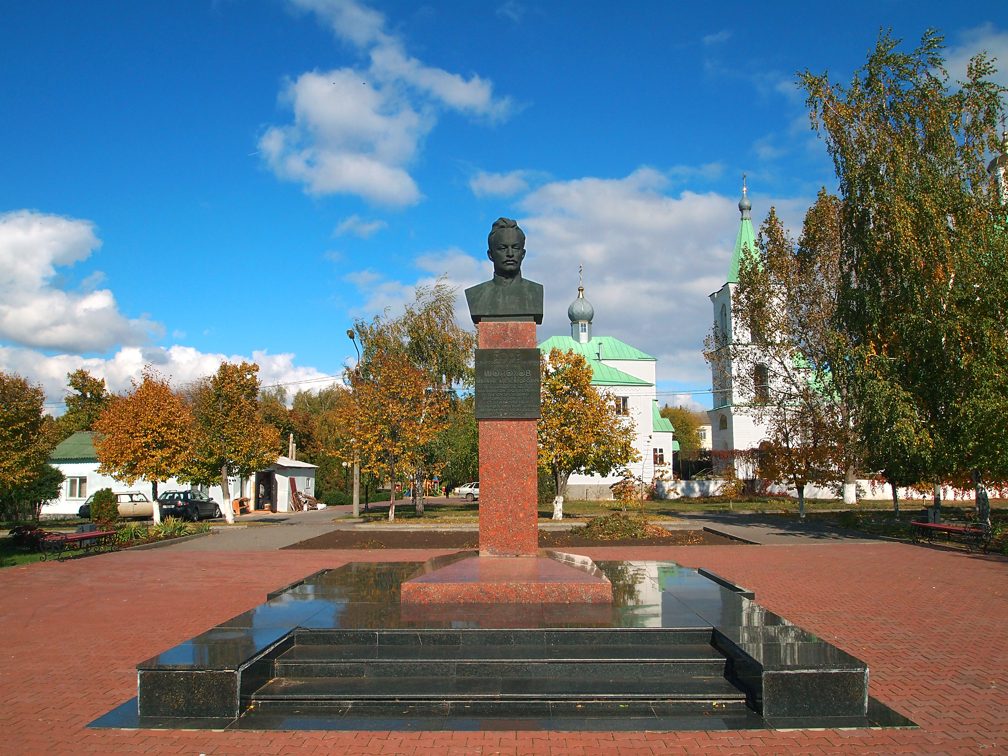 Бюст М.А. Шолохова: улица Подтелкова, 74, Вёшенская, Шолоховский район, Ростовская область